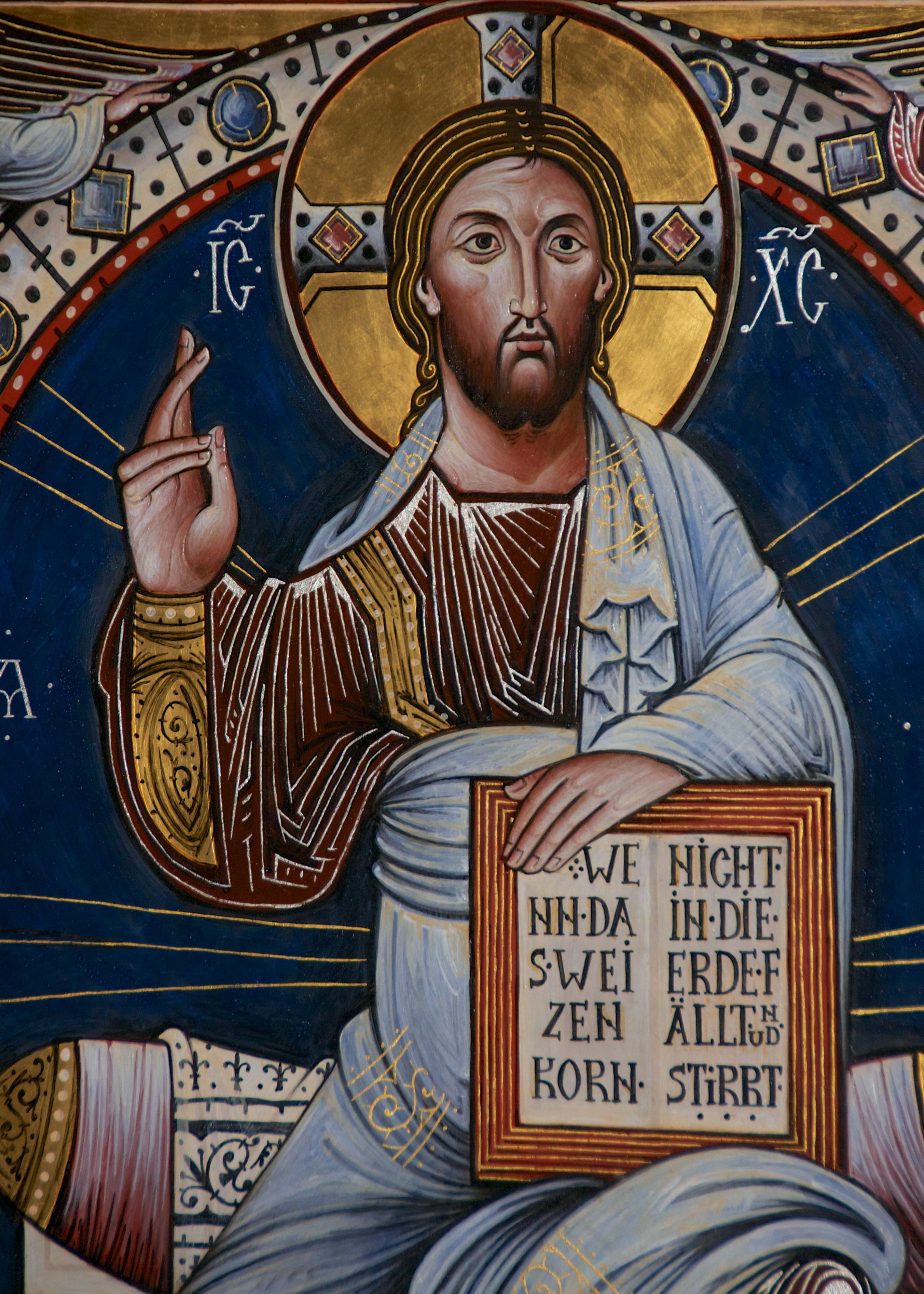 Ikonenkreuz von Fr. Andrej Davydov